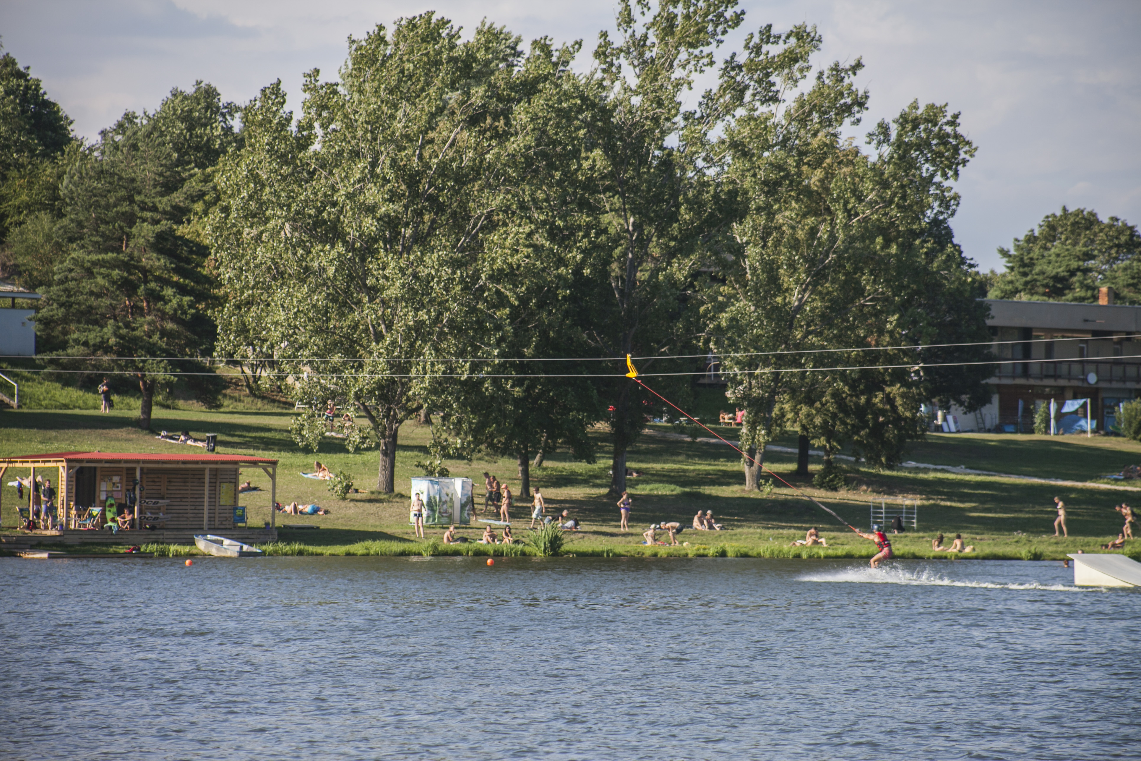 Озеро Джбан рядом с учебным центром Прага - Кристалл. Фото: Дита Хавранкова